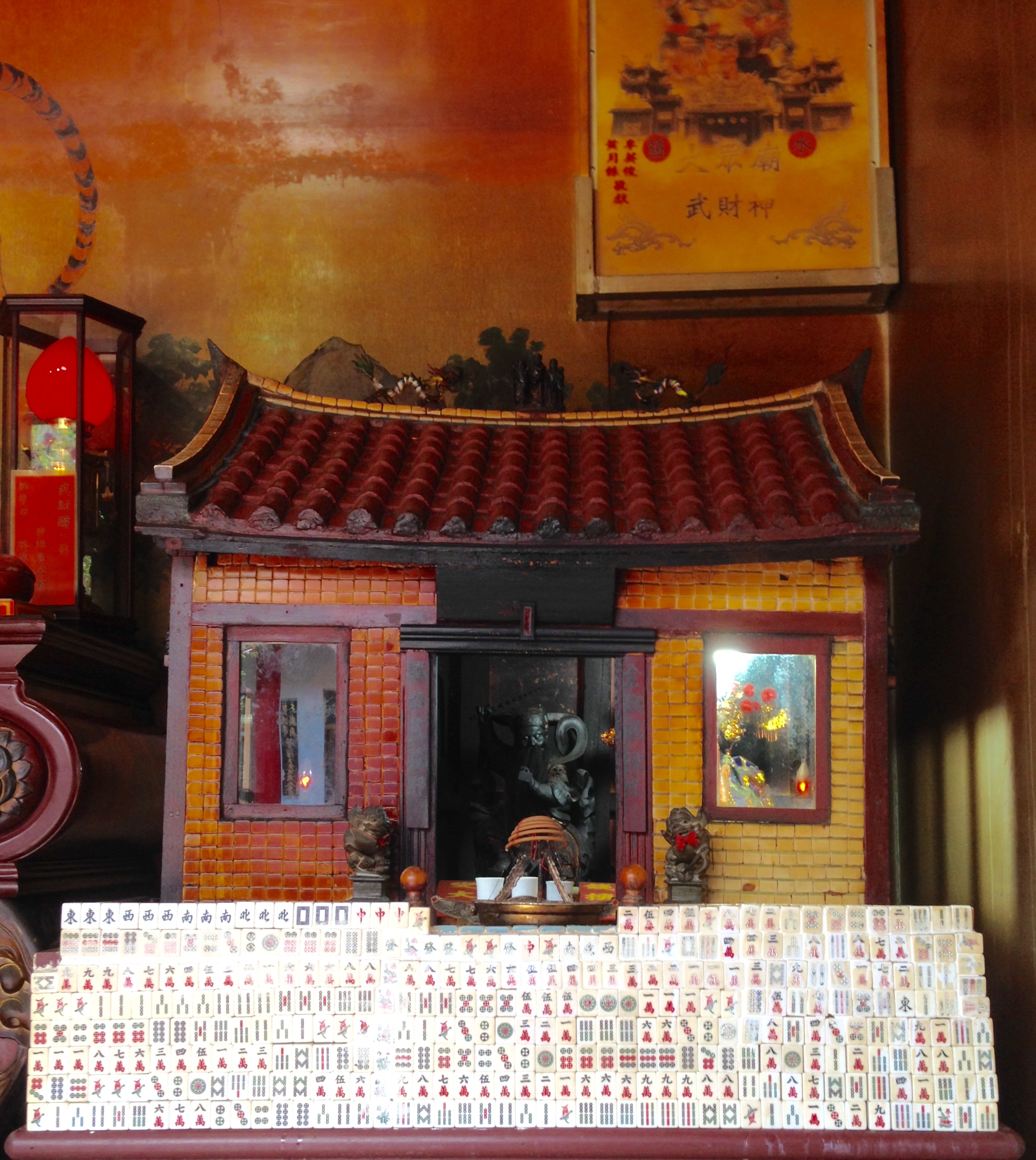 鹽水大眾廟之麻將廟